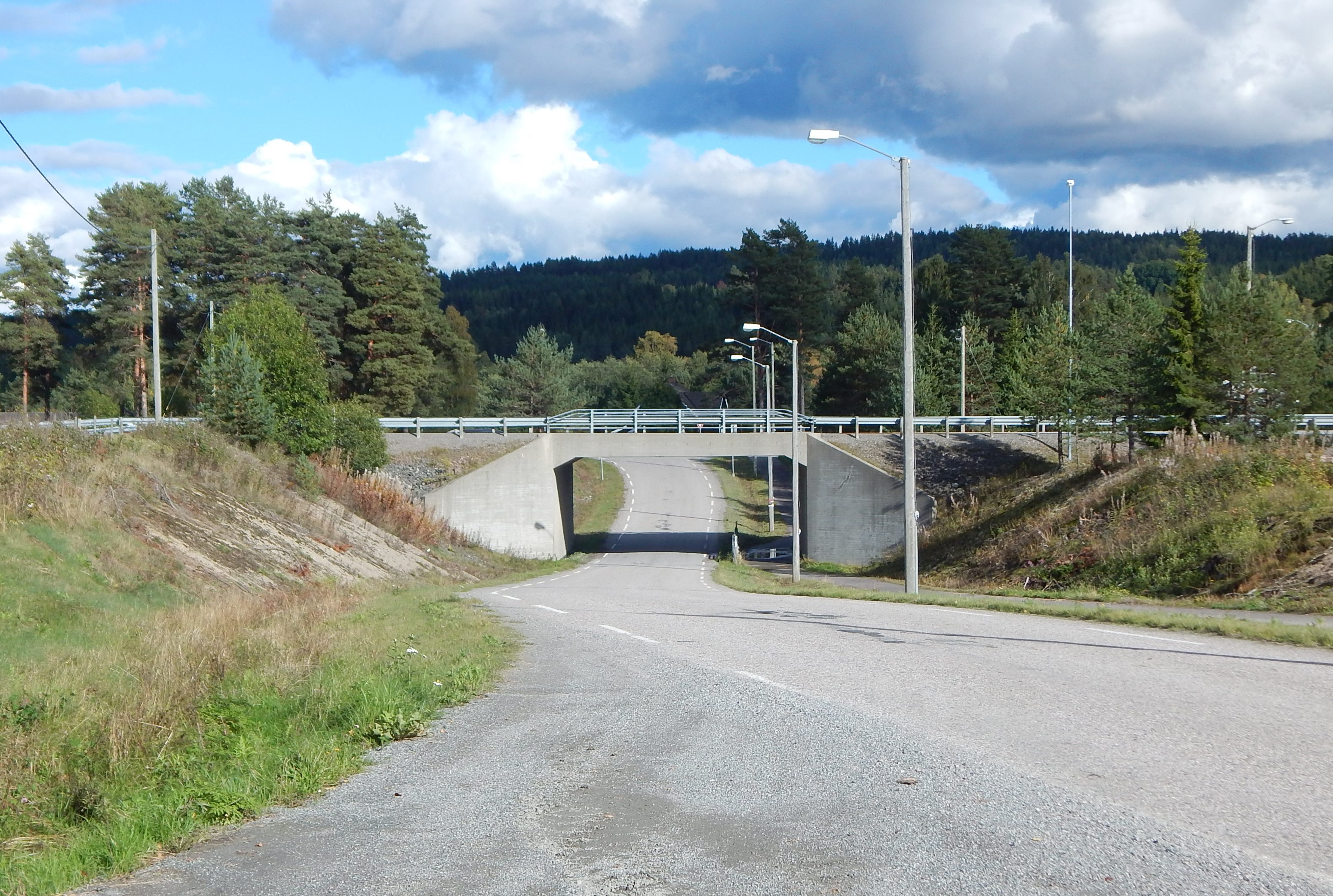 Rødbergvegen (fylkesvei 1970, tidl. 331) krysser under riksvei 2.